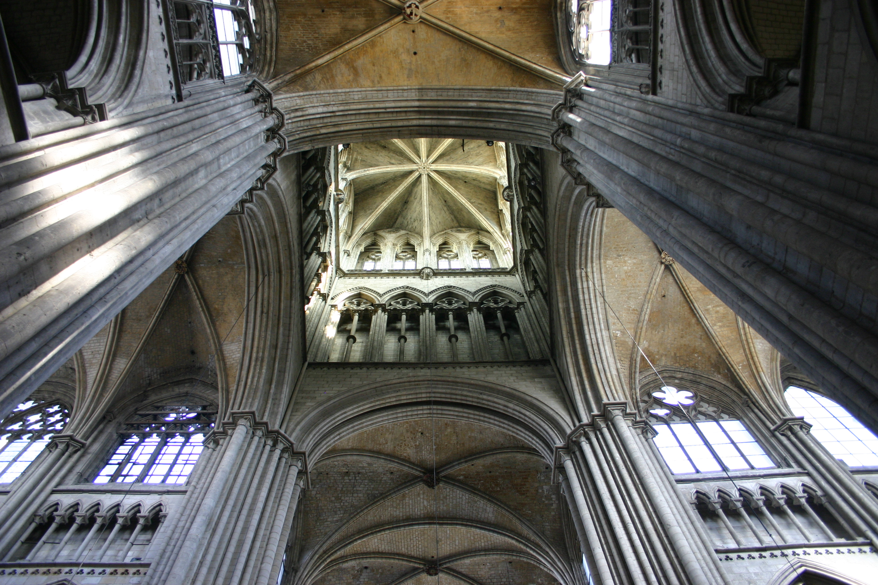 interno della cattedrale